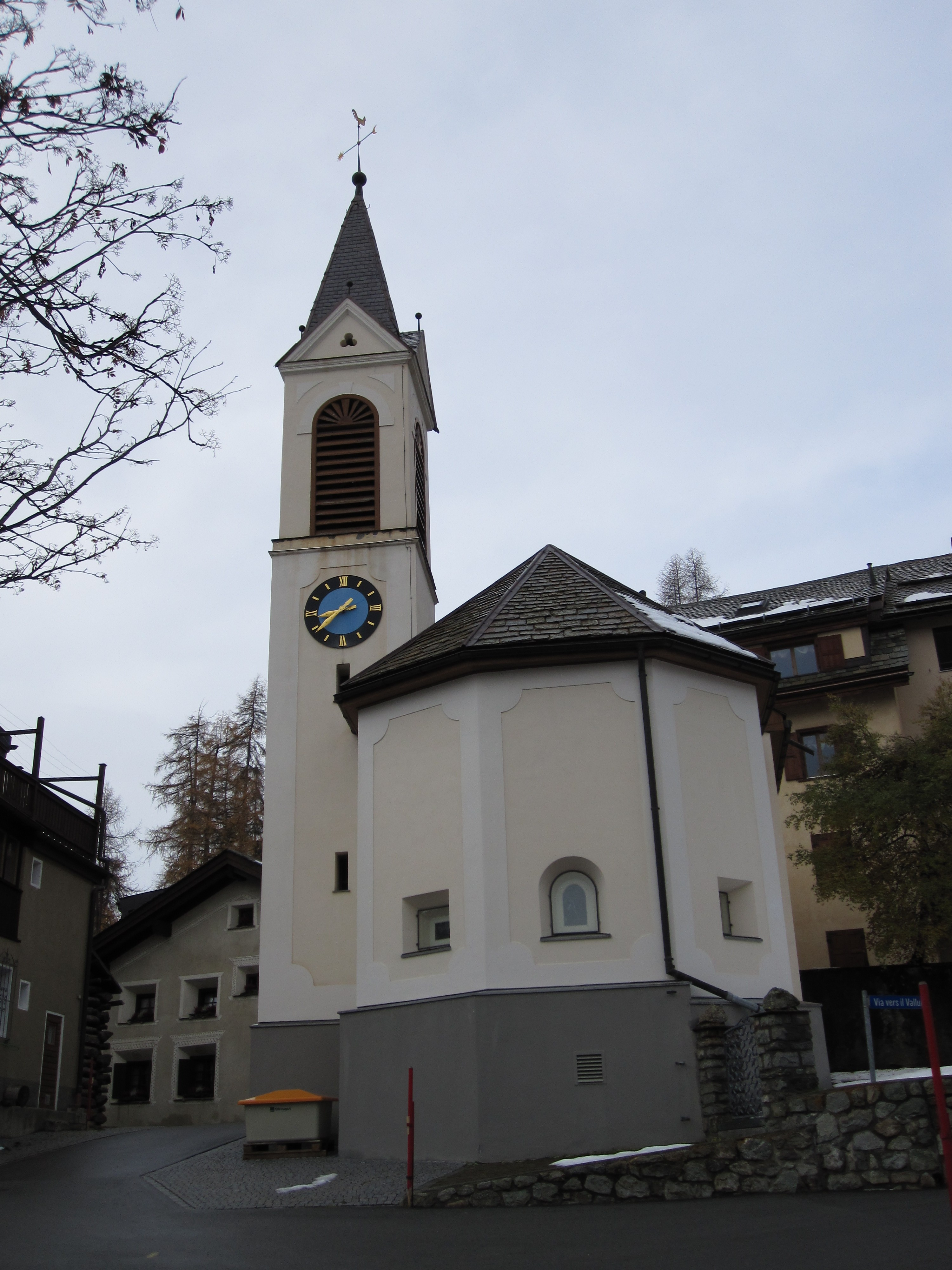 die reformierte Kirche in Champfèr (Oberengadin, Kanton Graubünden)